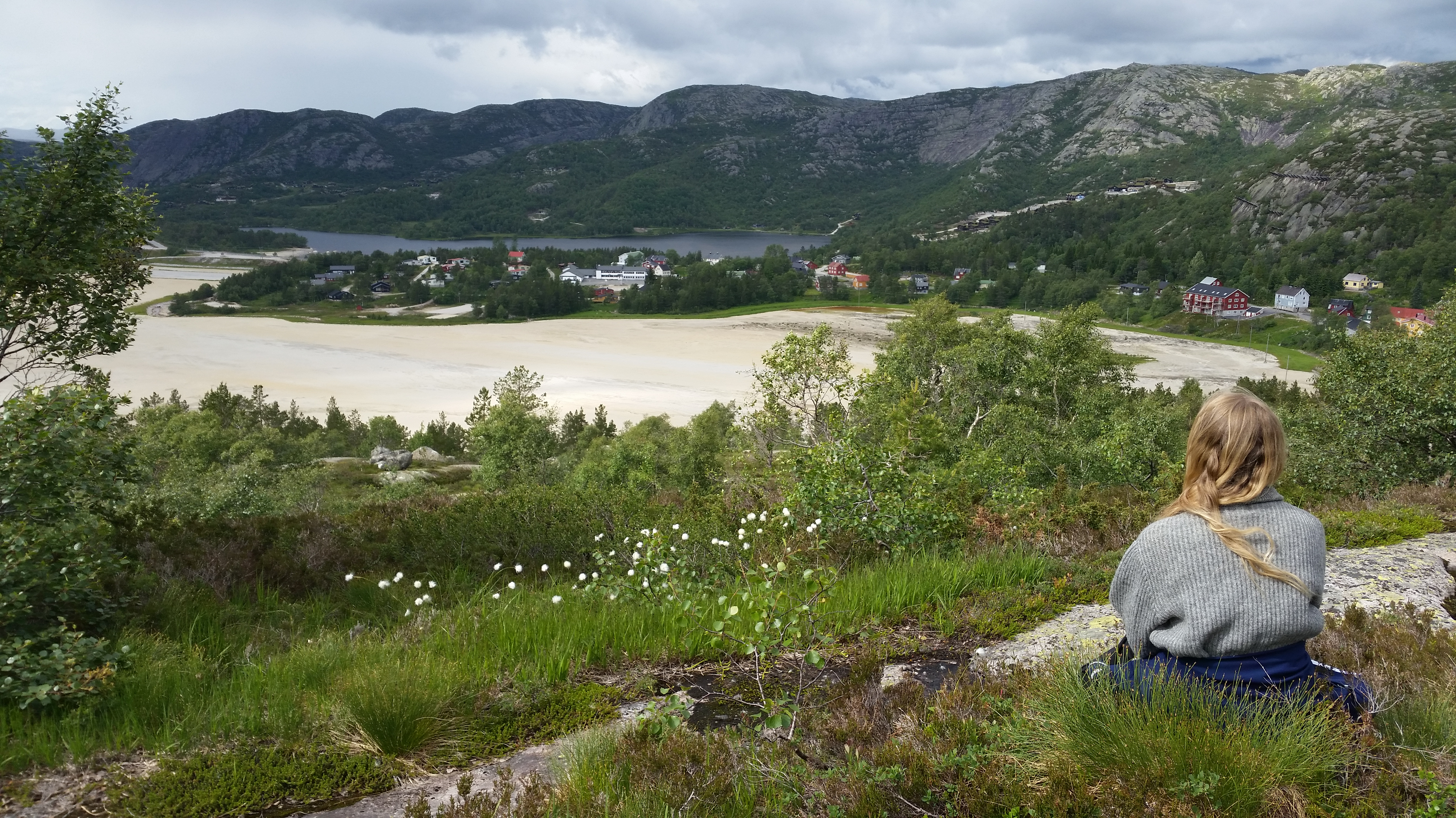 Sanden og Knabetjørn.